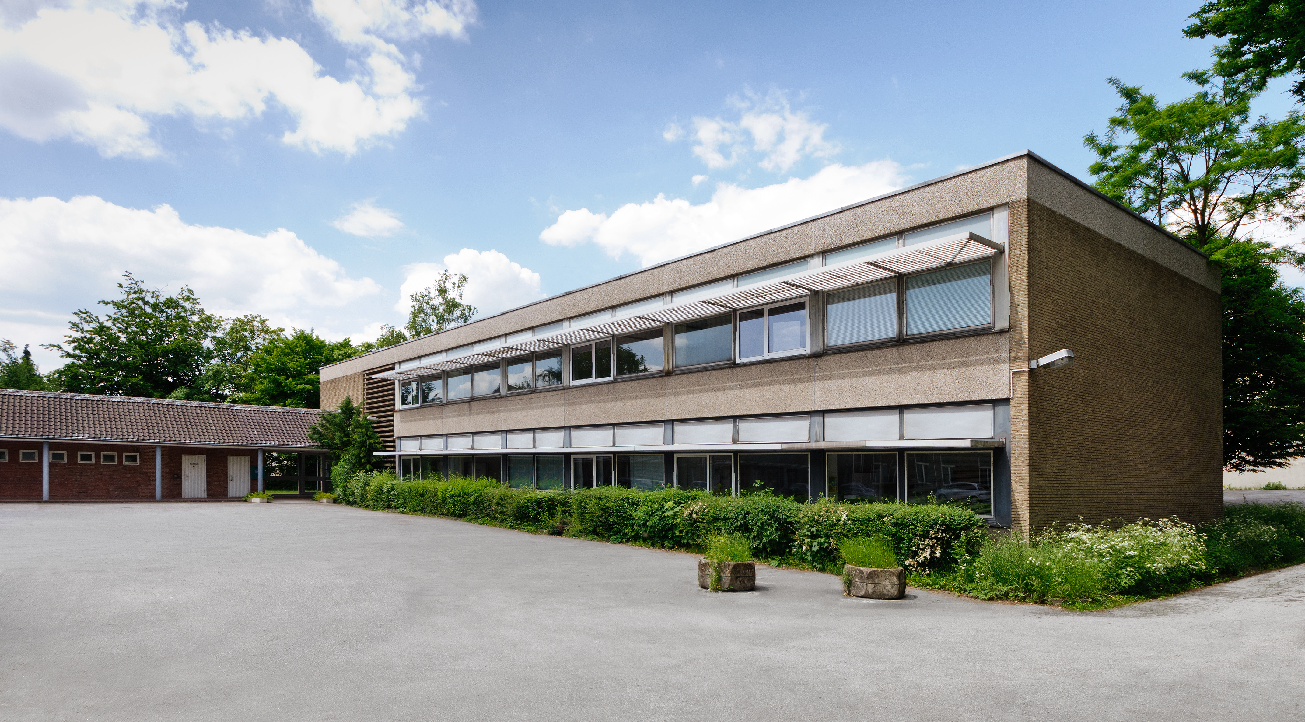 VHS-Haan